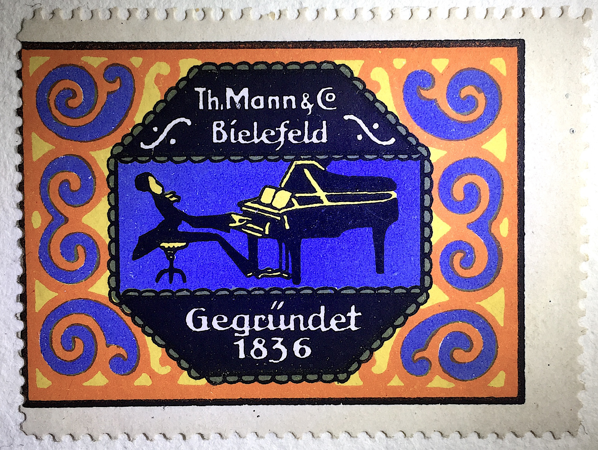 Werbemarke der Pianoforte-Fabrik Th. Mann & Co.